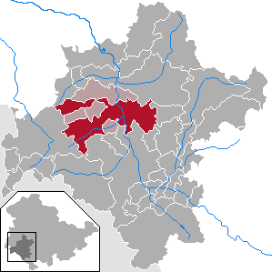 Wasungen in Thuringia - District Schmalkalden-Meiningen